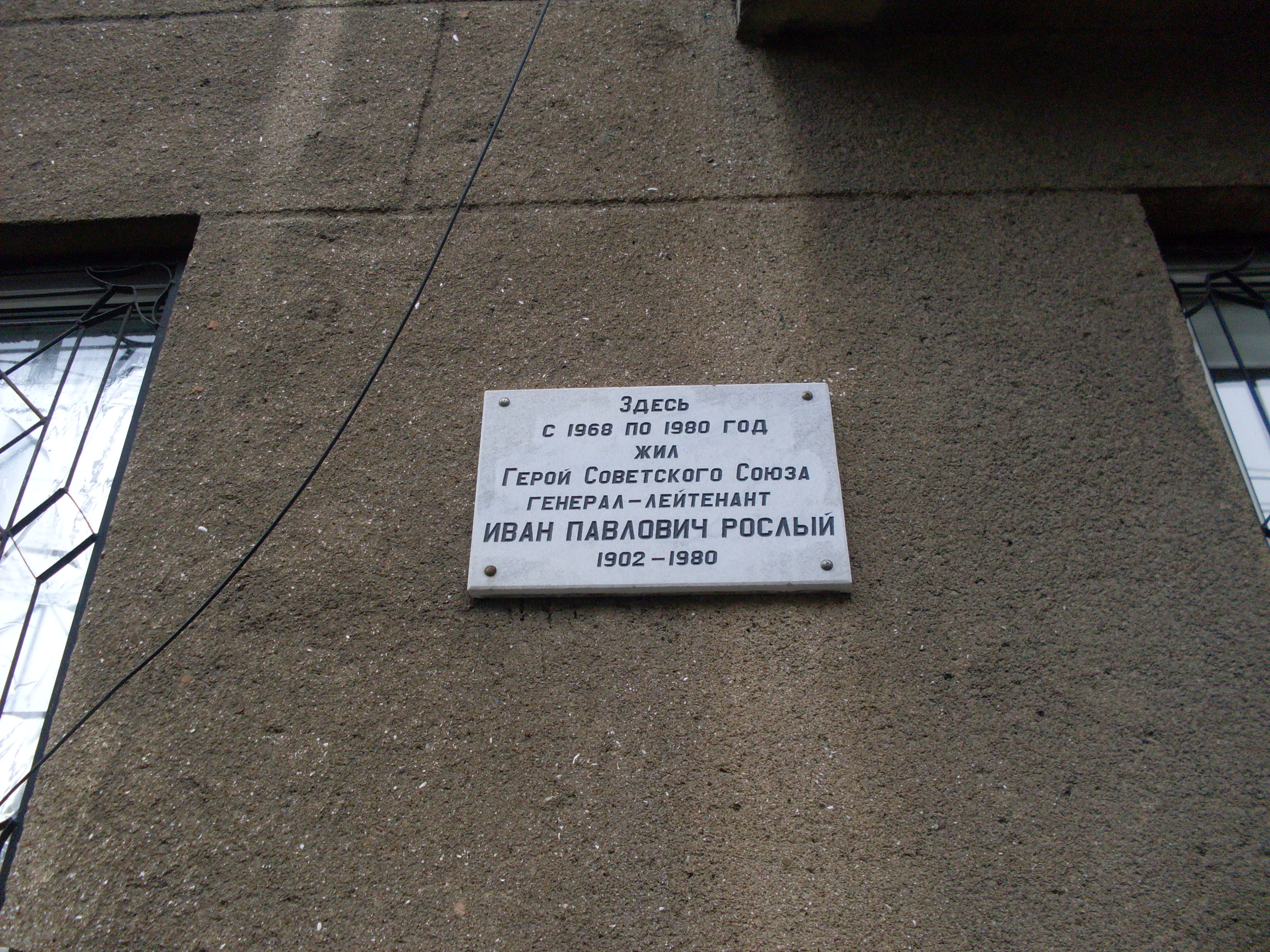 мемориальная доска на доме в котором жил Герой Советского Союза Иван Павлович Рослый. Одесса.